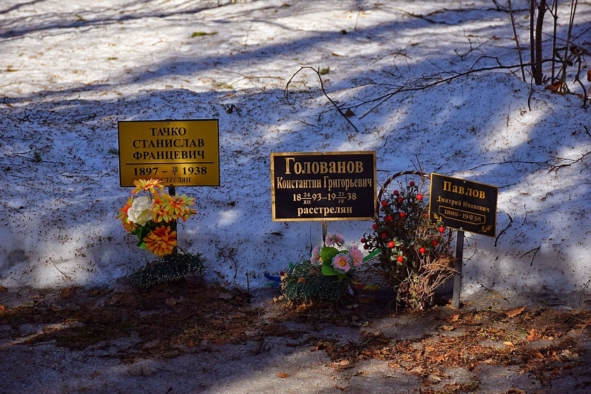 Спецобъект «Коммунарка» - место расстрелов жертв политических репрессий: Сосенский сельский округ, 24-й км Калужского шоссе, Новомосковский округ, Москва